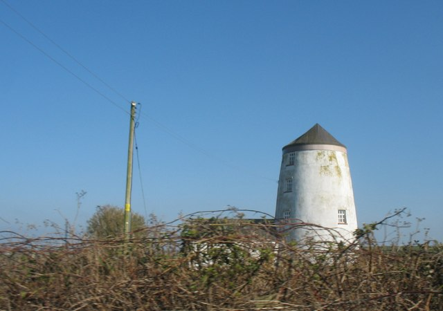 Melin Mechell, Anglesey